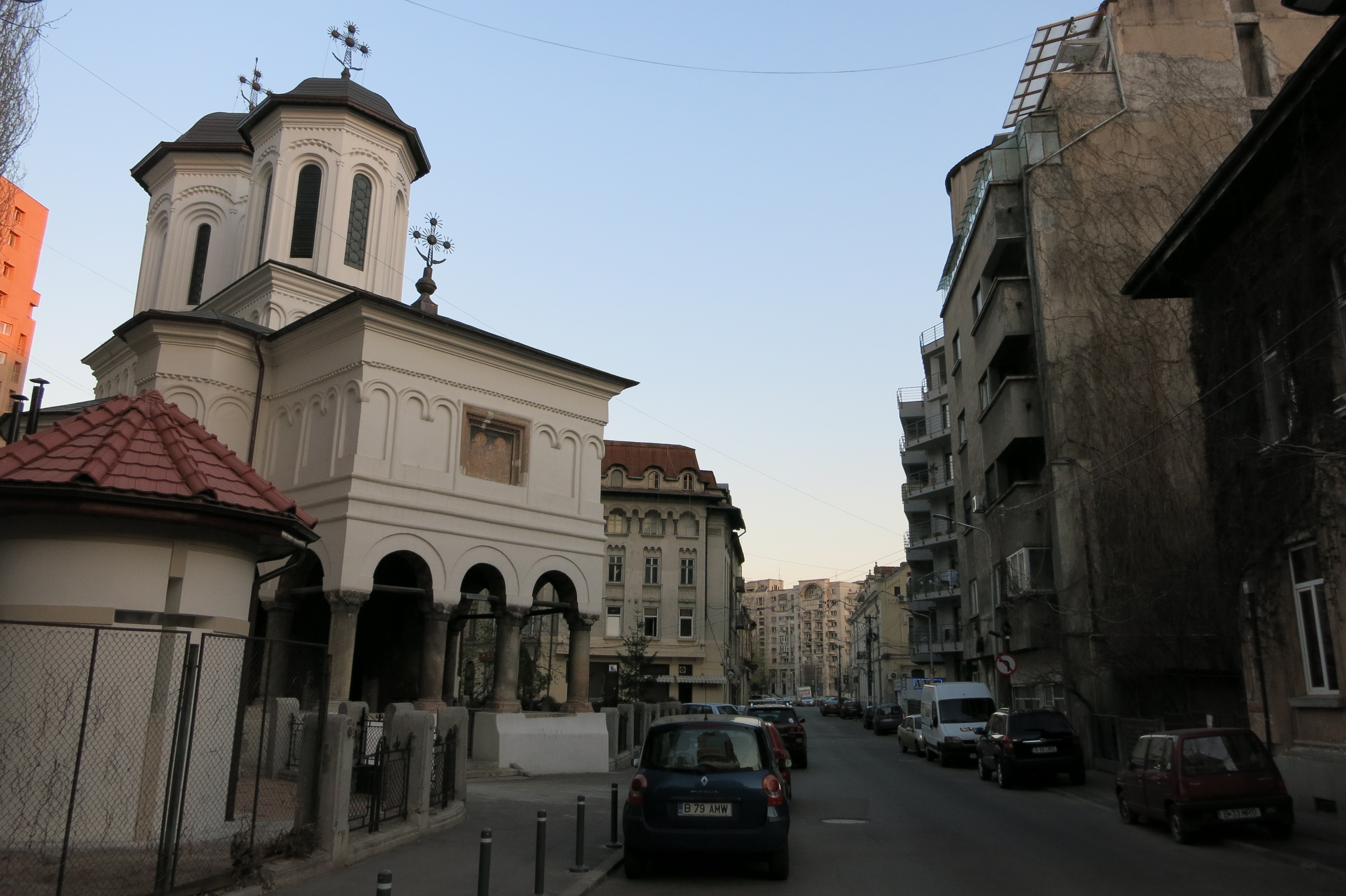 Biserica Sf. Apostoli de pe str. Sf. Apostoli, nr. 1, București, sector 5 01